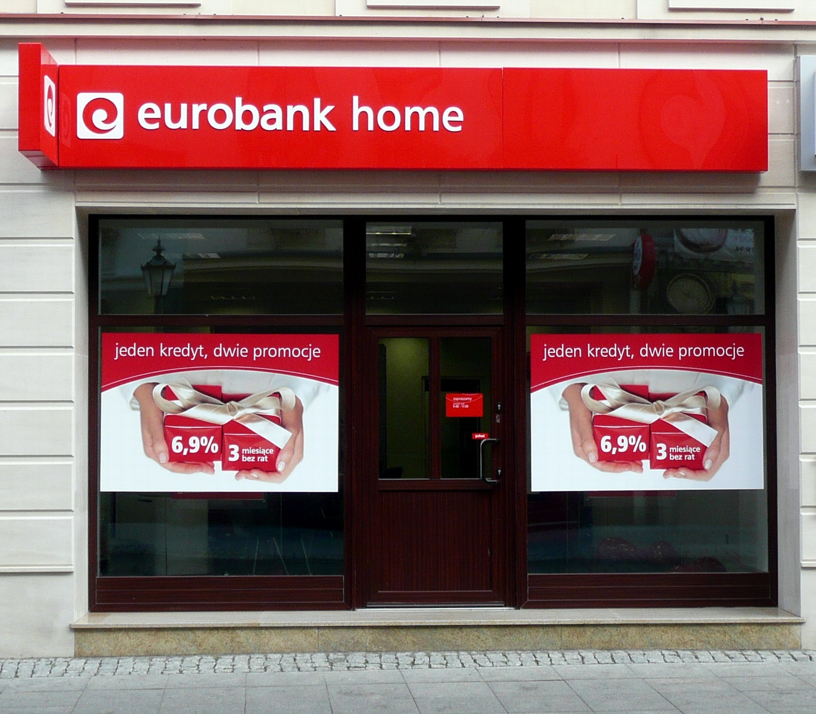 Oddział Eurobanku w Bydgoszczy, ul. Długa 47